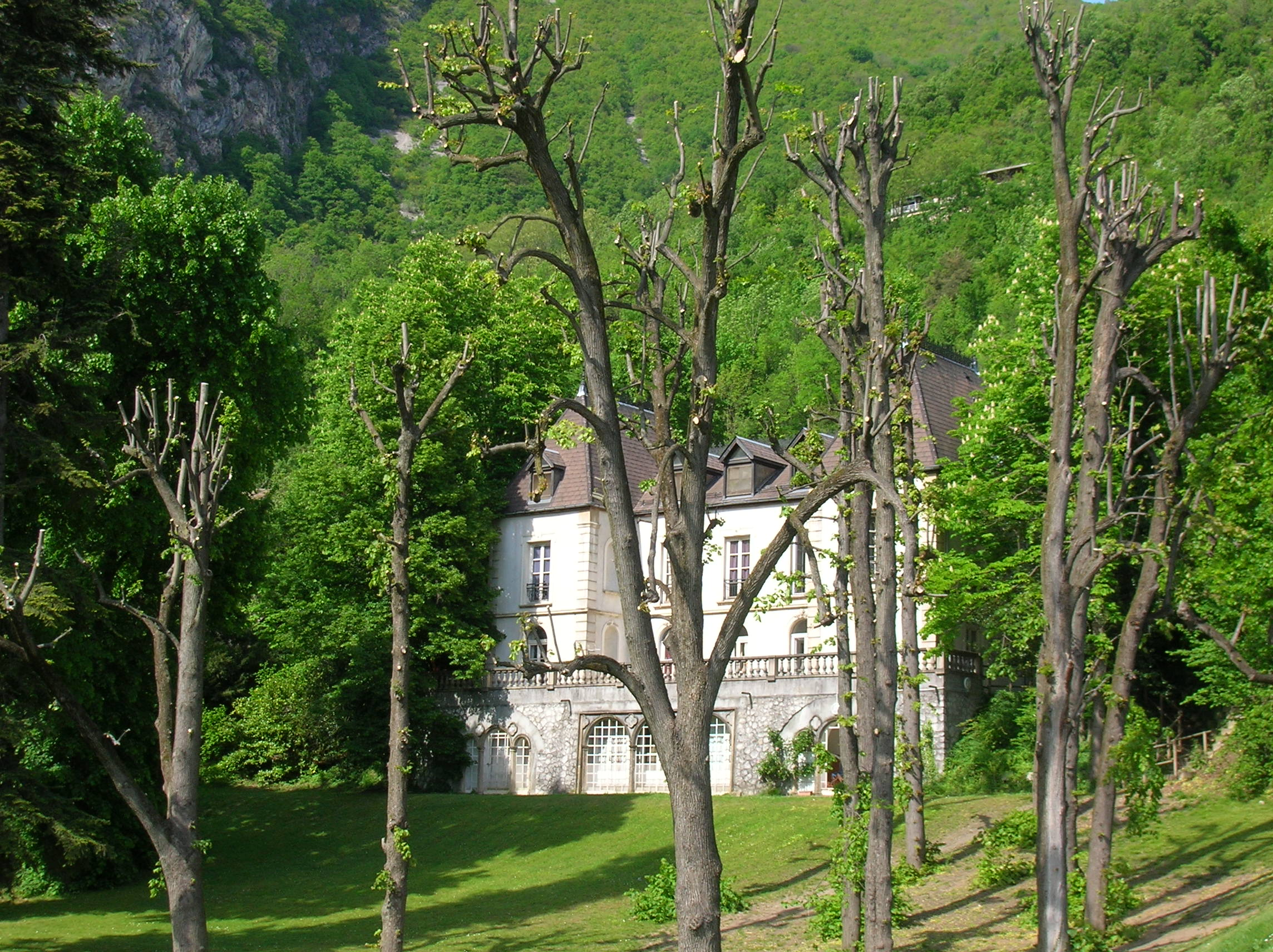 Château de la Balme. Rue de la Balme, Saint-Martin-le-Vinoux, Isère, France.